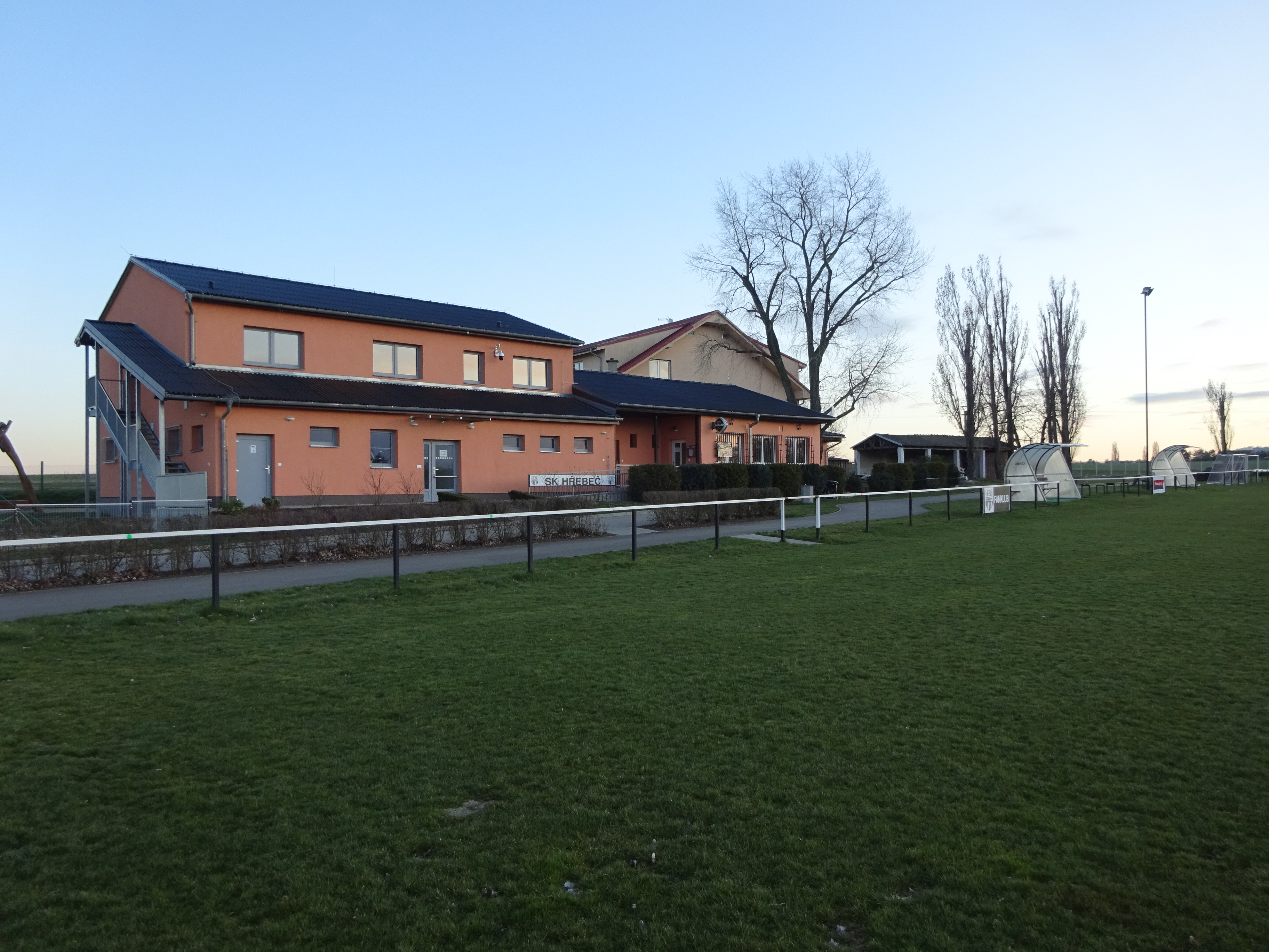 hřiště SK Hřebeč